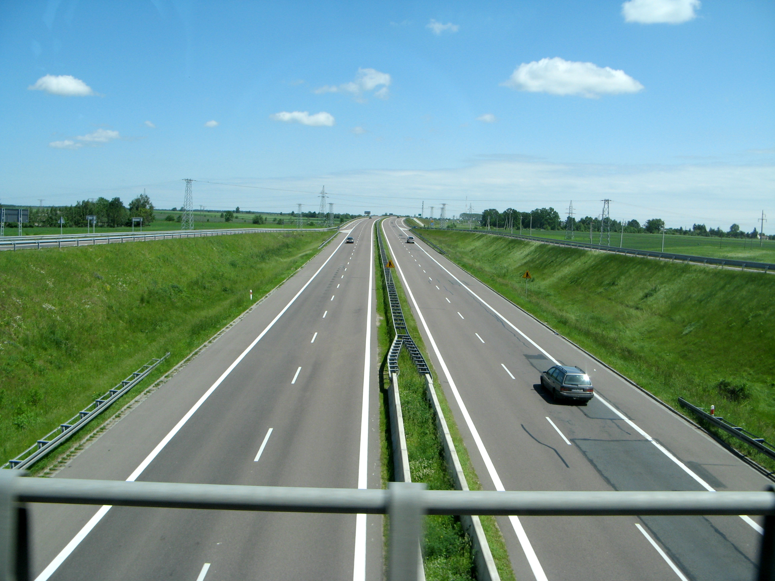 Droga ekspresowa nr 8 w ciągu obwodnicy Ostrowi Maz. (widok z węzła "Łomża" w kierunku na Białystok)